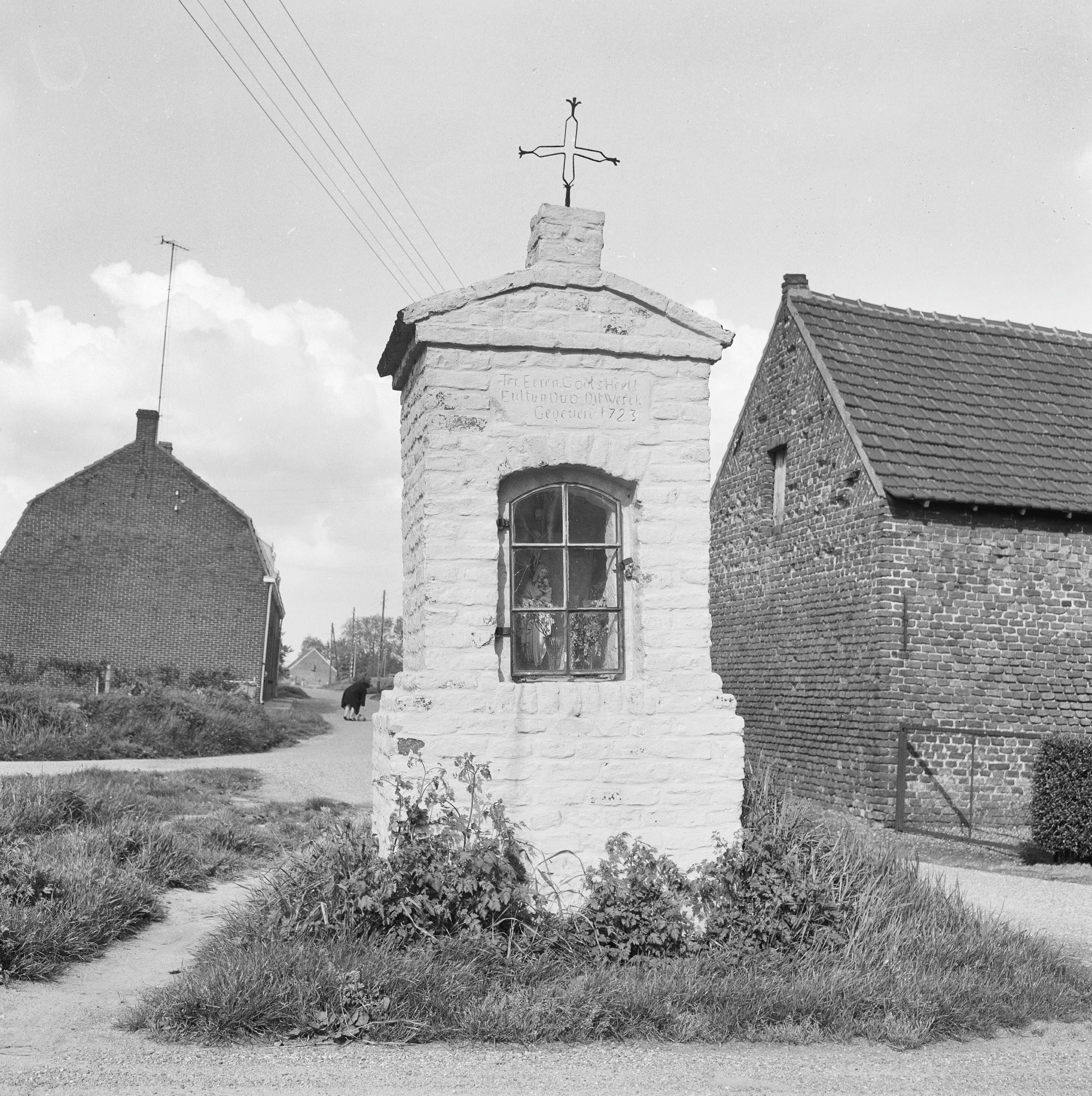 Middelhoven, kapel - anno 1723 - verplaatst in 1981